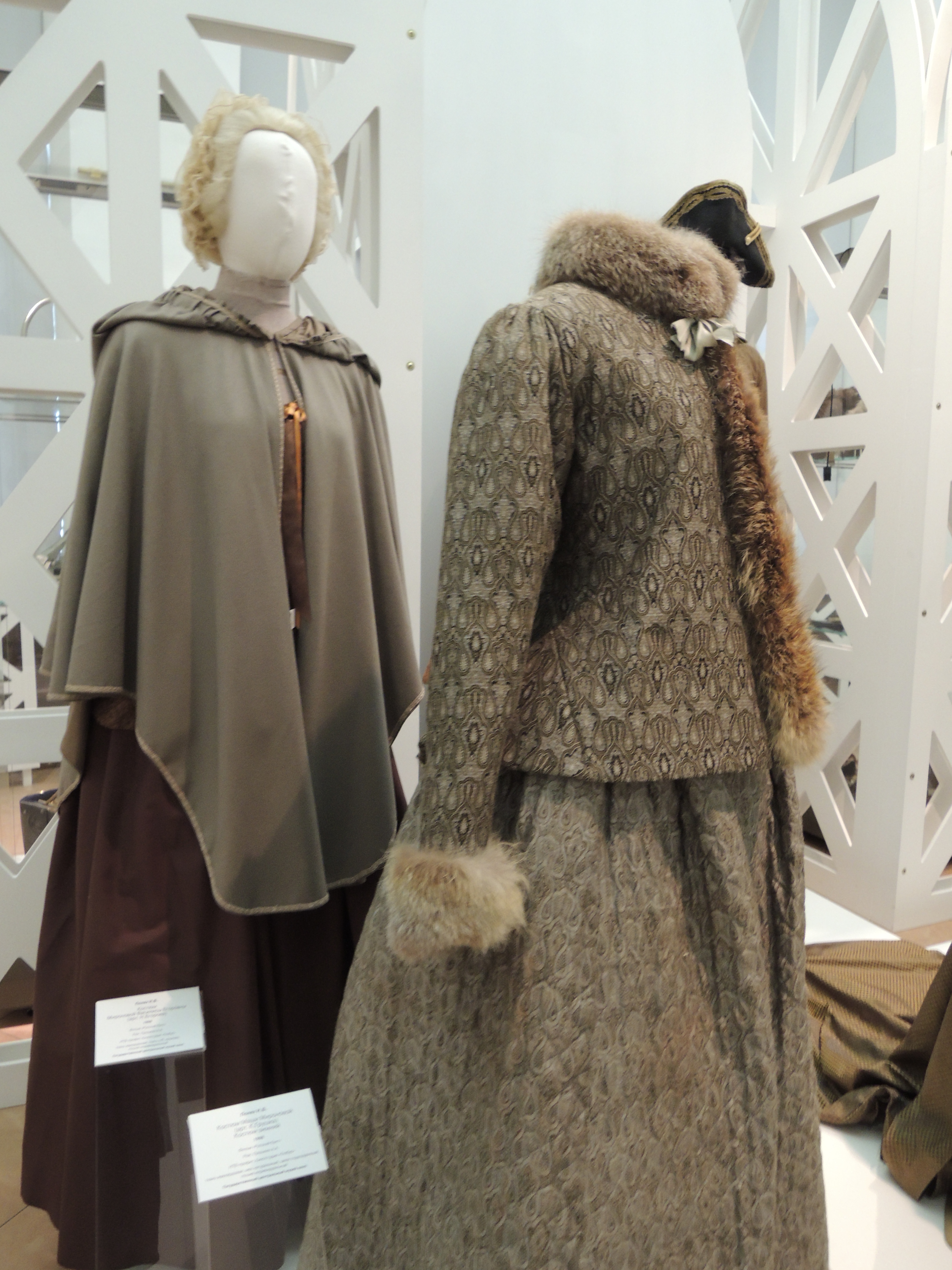 Костюмы для Н. Егоровой в роли Василисы Егоровны Мироновой и К. Грушки в роли Маши Мироновой (зимний) для фильма «Русский бунт» (2001). Худ. Полях Н. Б. Государственный центральный музей кино. Выставка «XVIII век на экране: Екатерина II и Фридрих II»